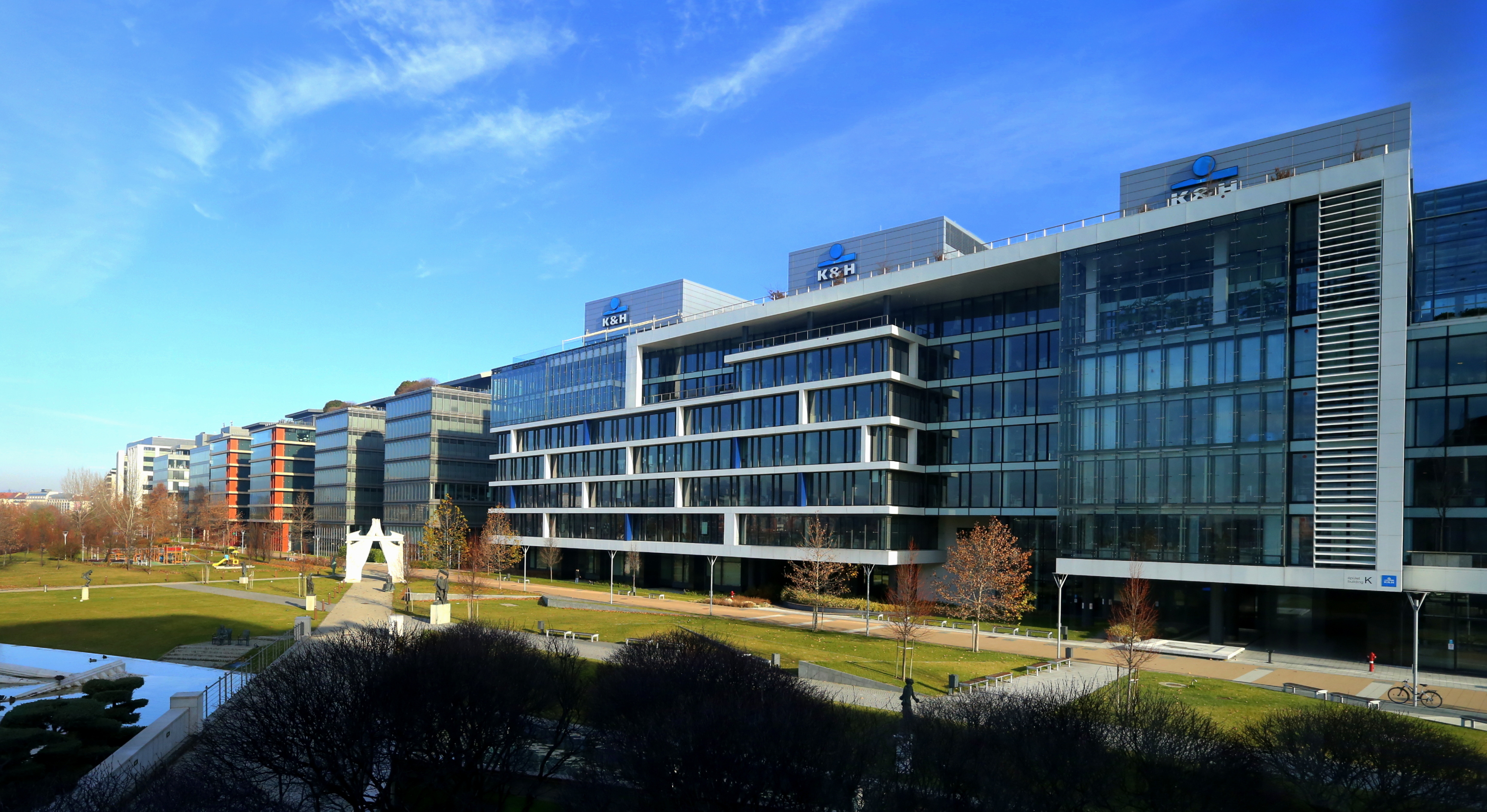 K&H Bank (Budapest, Lechner Ödön fasor 9)